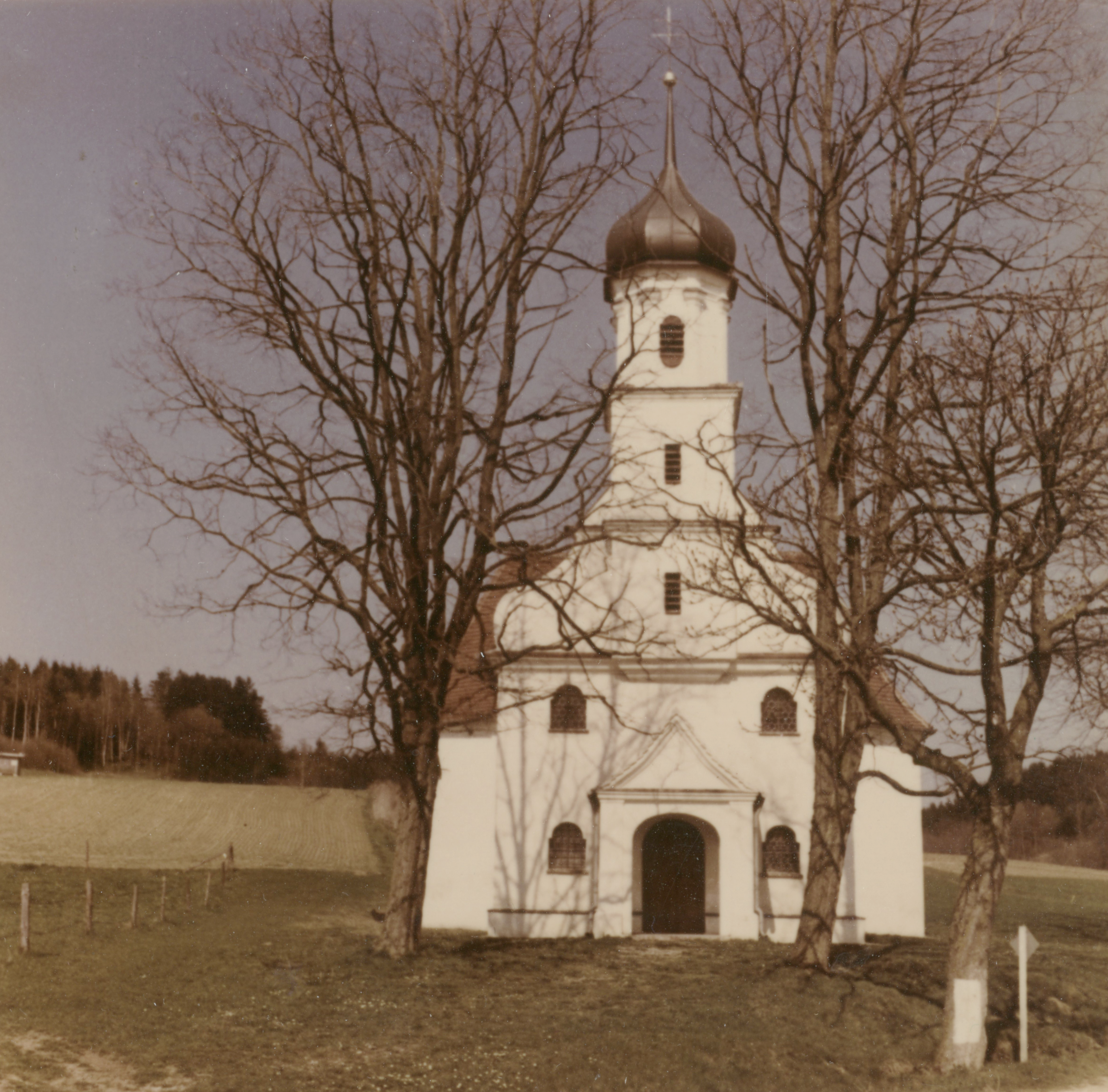 The pilgrimage church Heilig Kreuz in Mindelaltheim (Germany) probably in the 1950s.